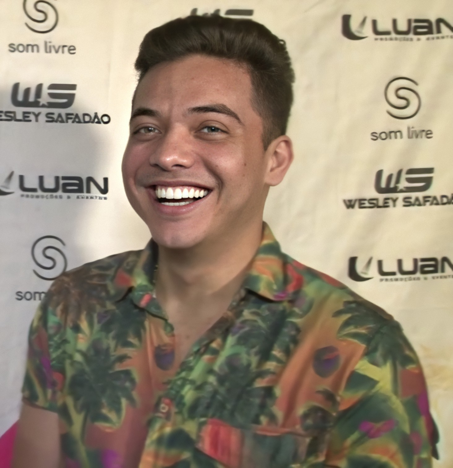 Wesley Safadão em 2018.